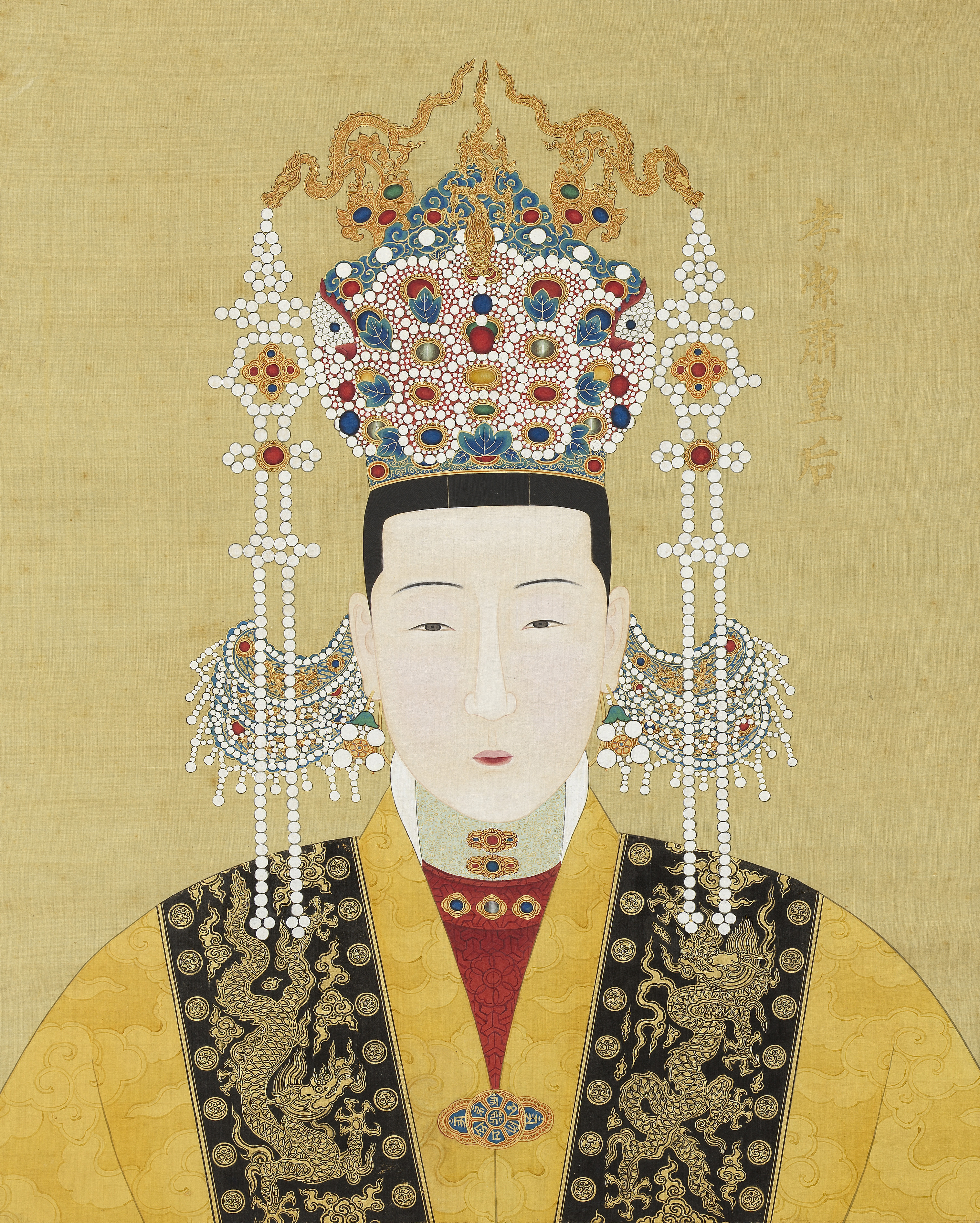 明代帝后半身像（二）冊